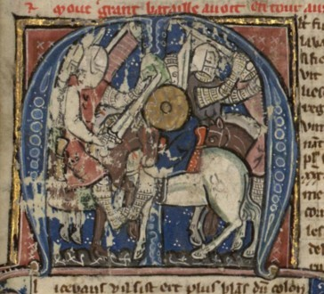 Battle of Ramla